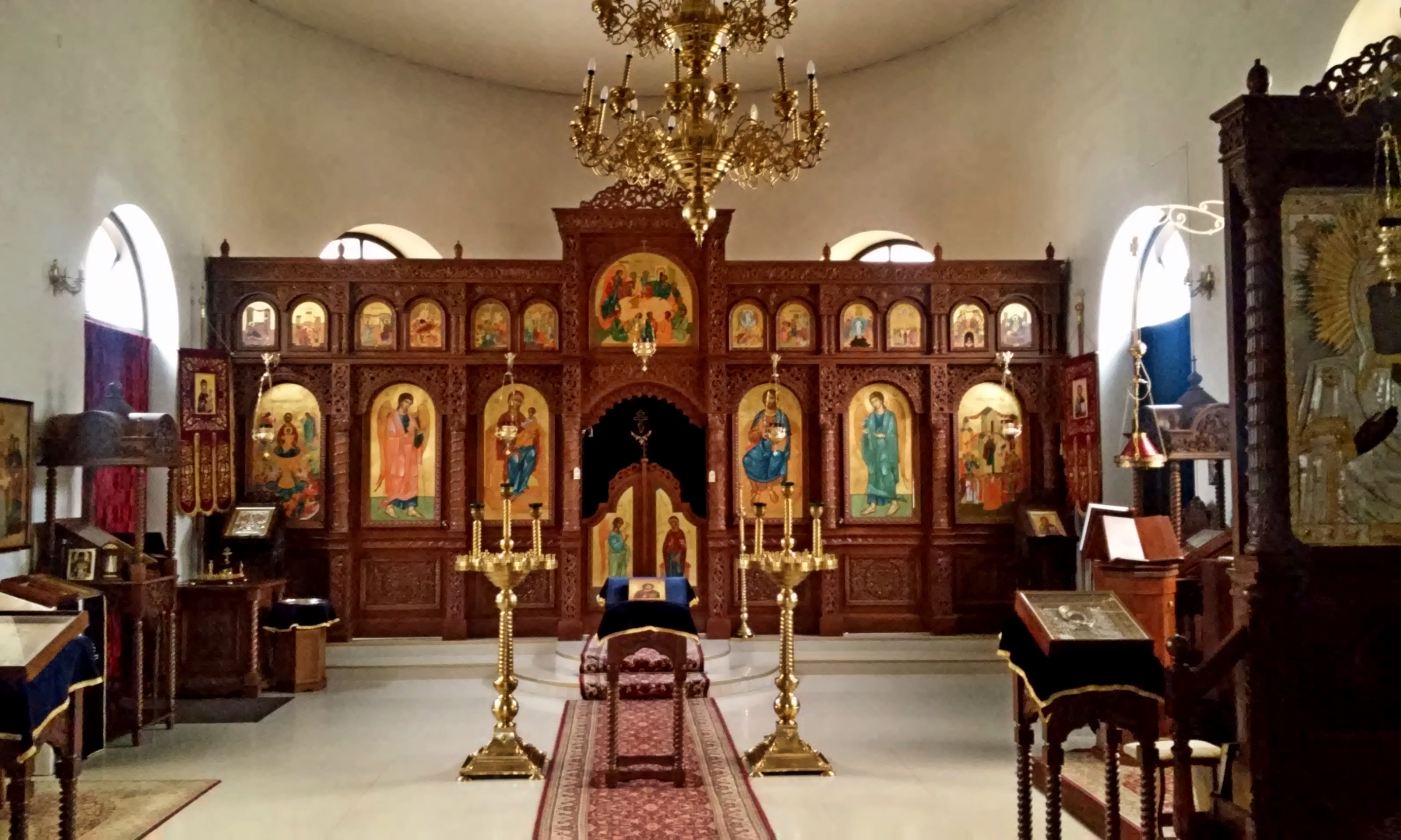 Ikonostas w cerkwi monasterskiej w Turkowicach